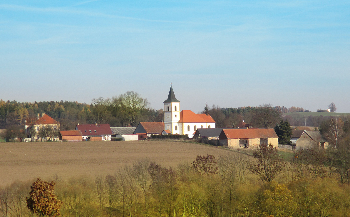 Vrcholtovice